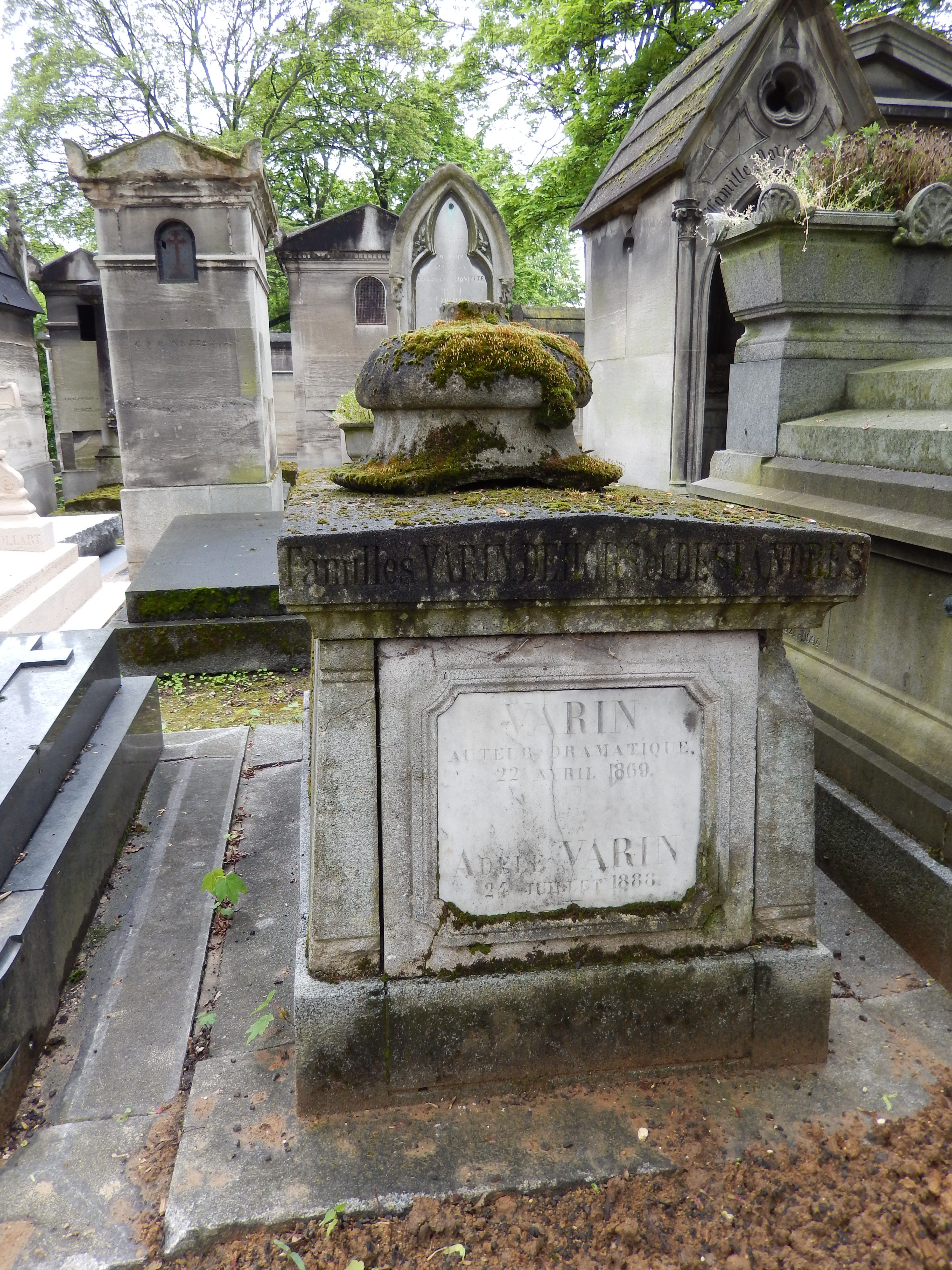 Tombe de Charles Varin (cimetière du Père Lachaise, division 67)